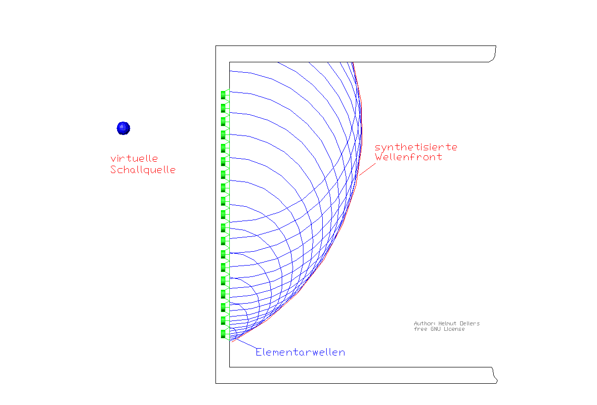 Prinzipdarstellung Wellenfeldsynthese